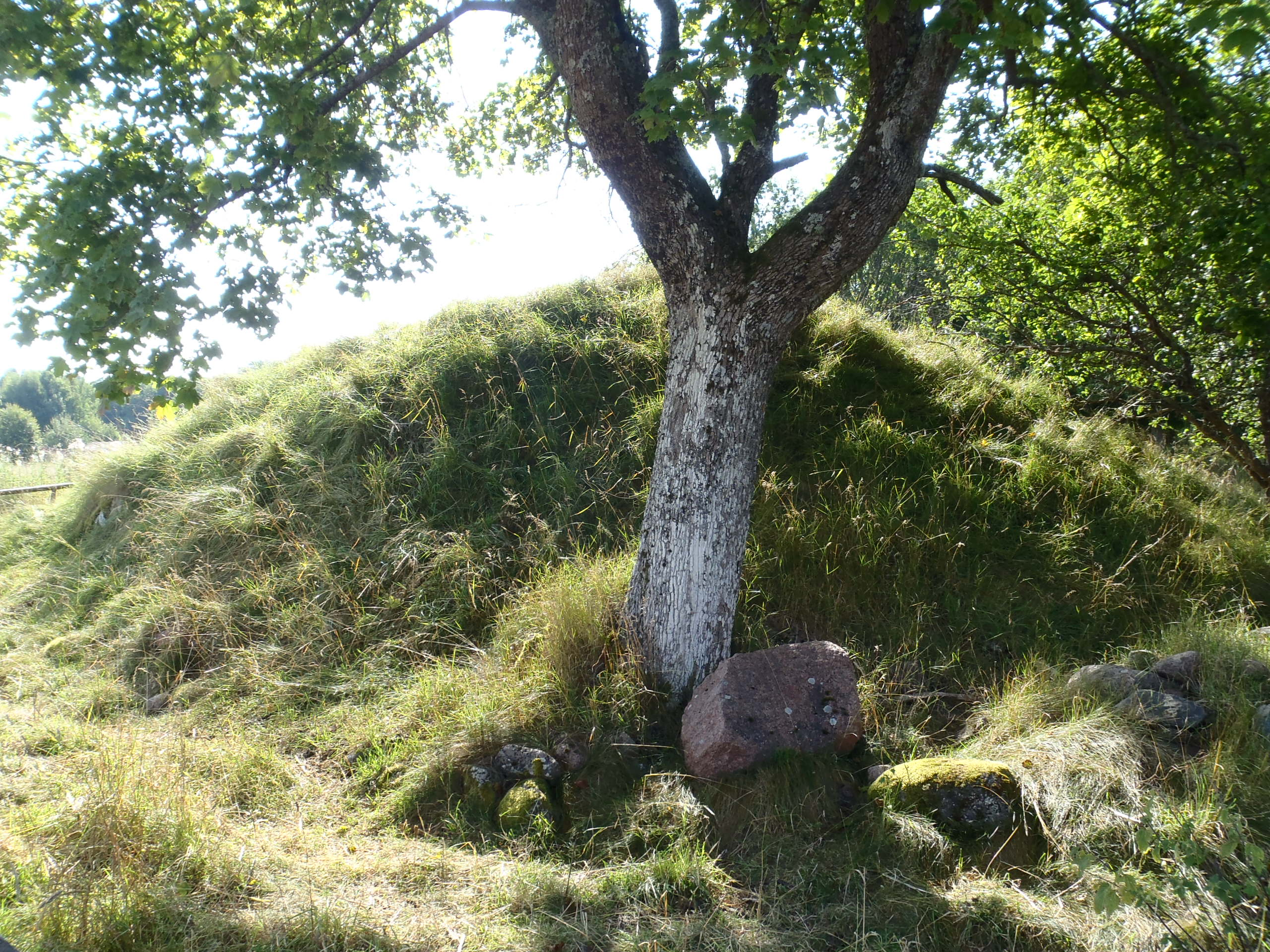 Kungshögarna i Godby är det mest kända gravfältet från yngre järnålder i Godby, omfattande 37 kända anläggningar, varav ett par av dessa är bland de största på Åland. Fyra av gravarna hade ursprungligen resta stenar på toppen, men dessa ligger nu omkullfallna. Delar av gravfältet är utgrävt.